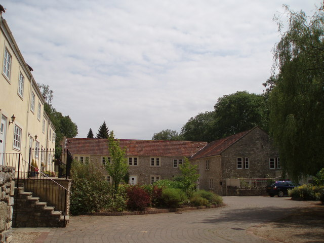 Darshill silk mills